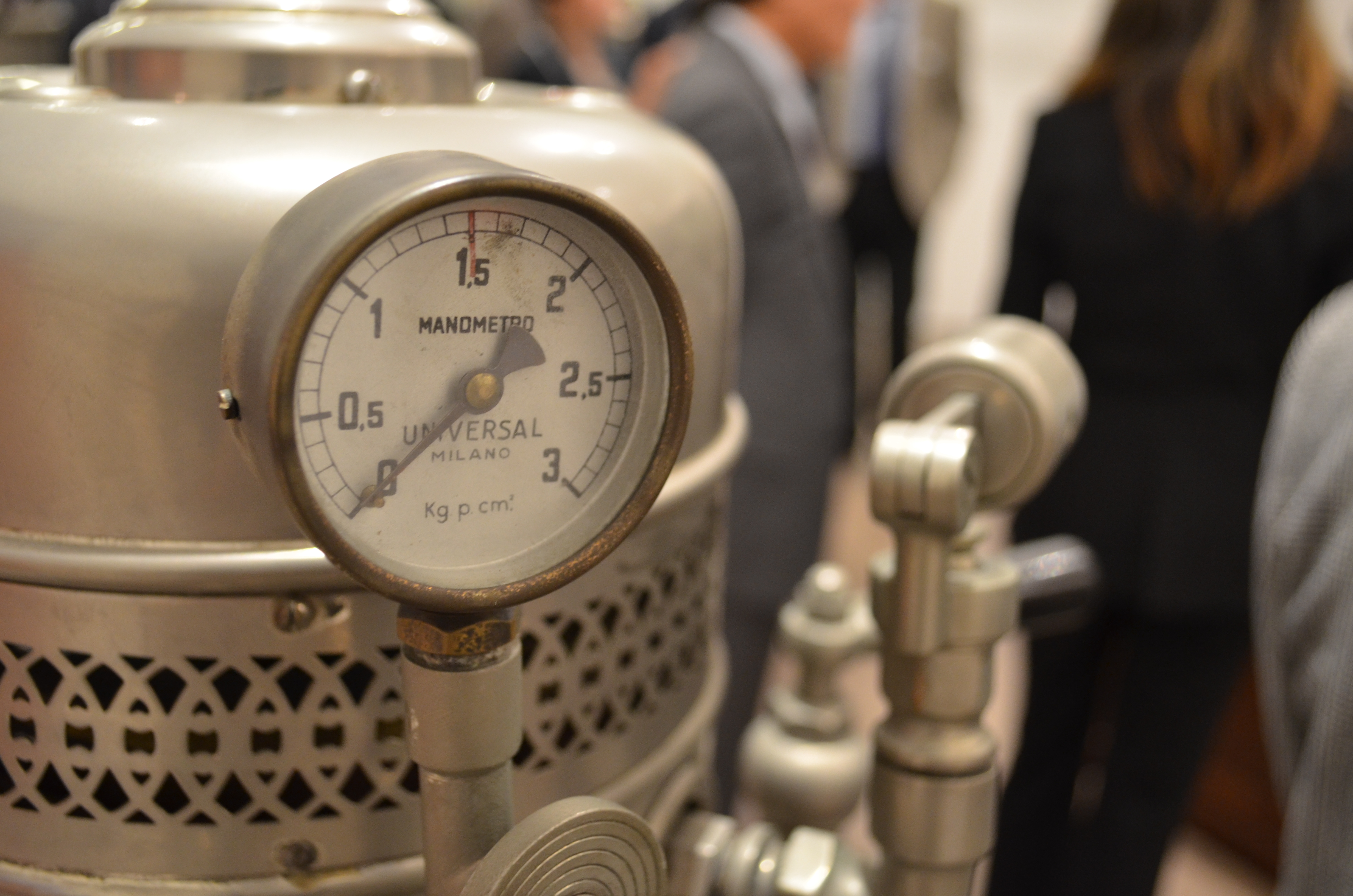 Mumac - manometro 3 bar di pressione (inizio del XX secolo) di una macchina da caffè expresso - Italia